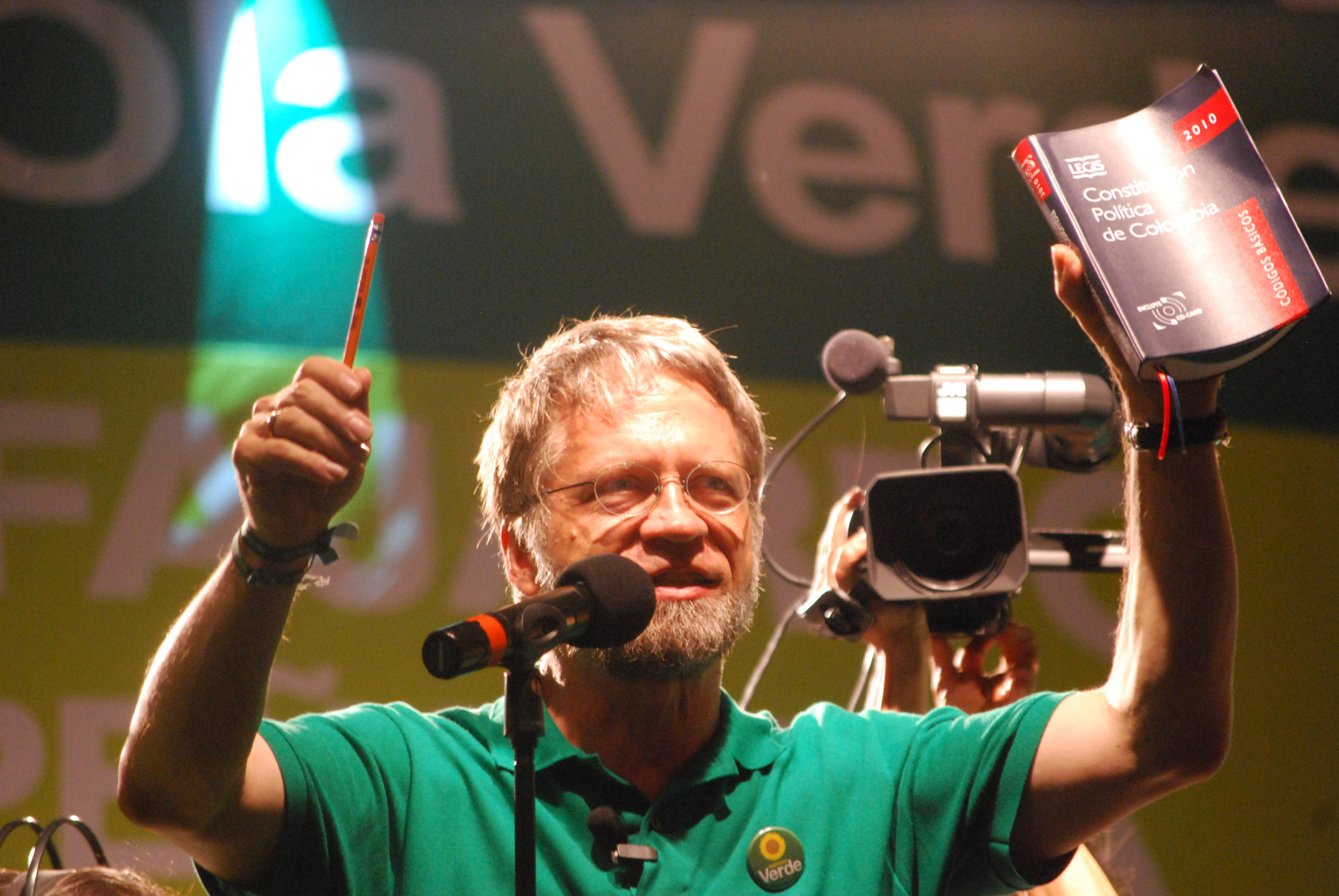 Antanas Mockus en campaña política